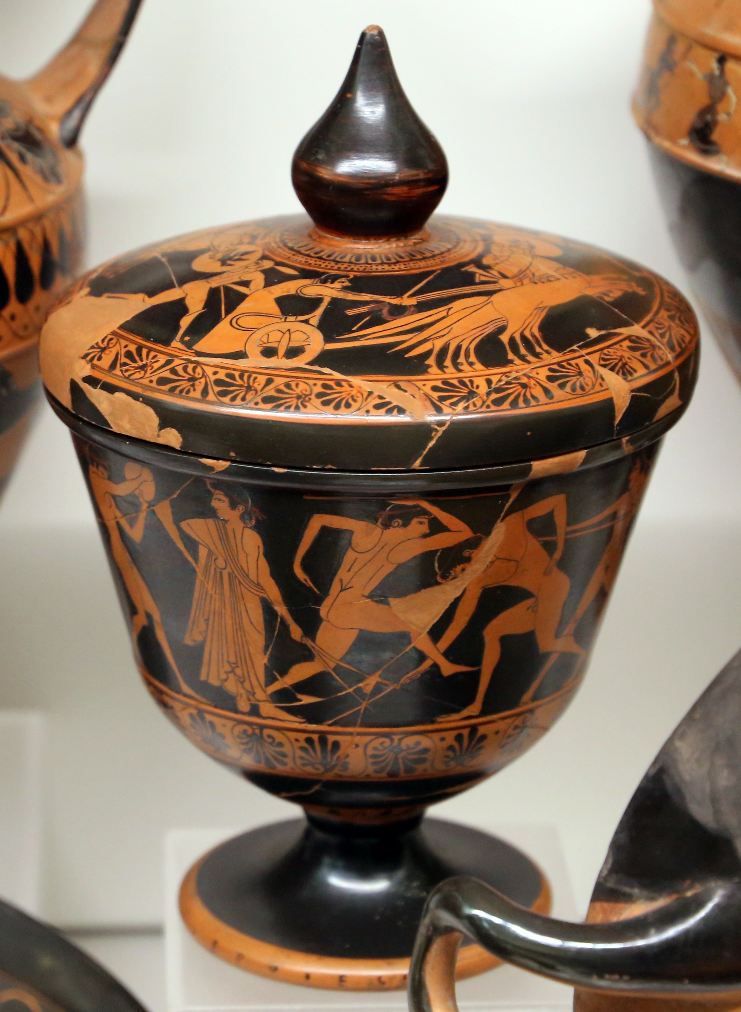 Villa Giulia (Rome) This is a photo of a monument which is part of cultural heritage of Italy.